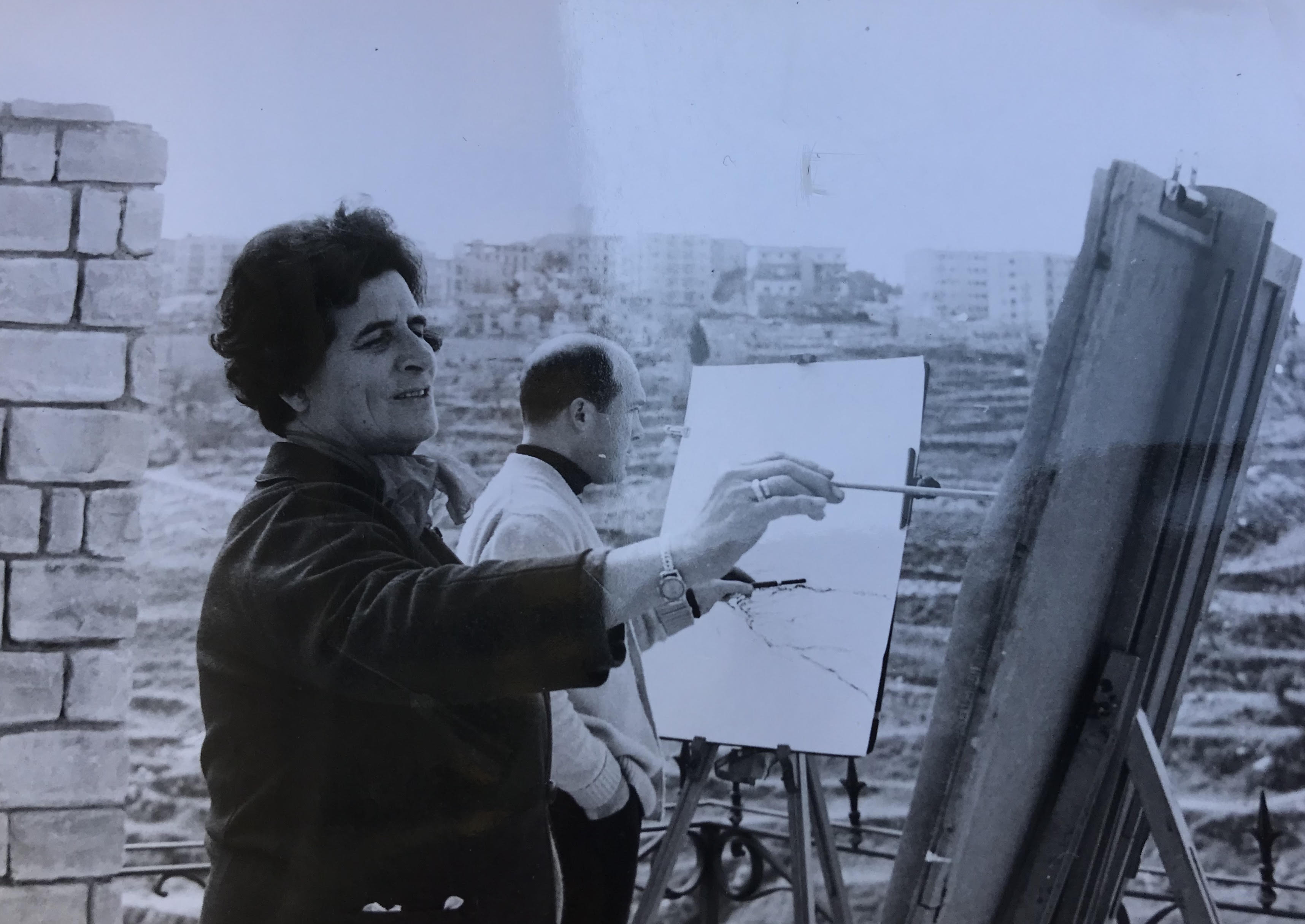 מתוך אוסף האלבום המשפחתי